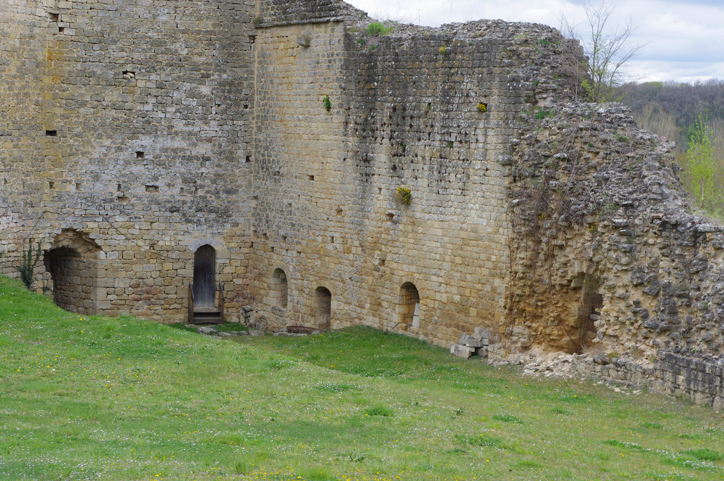 Cour du château fort de Gençay (Vienne, France)